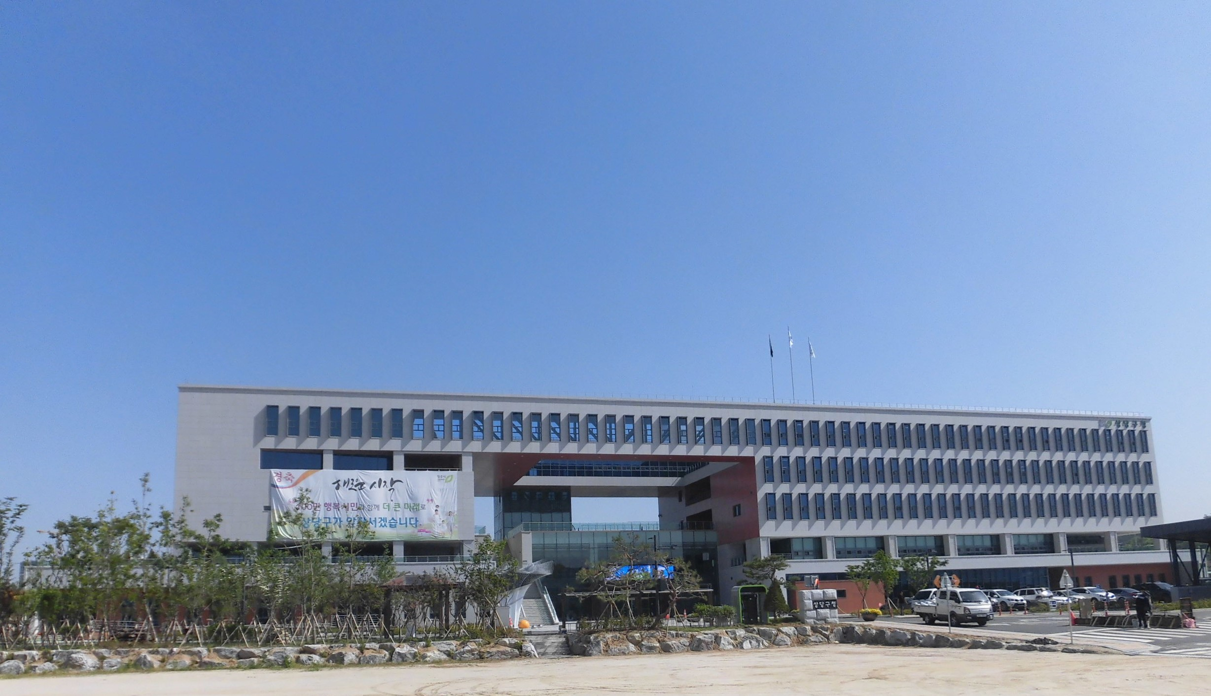 충청북도 청주시 상당구에 있는 상당구청